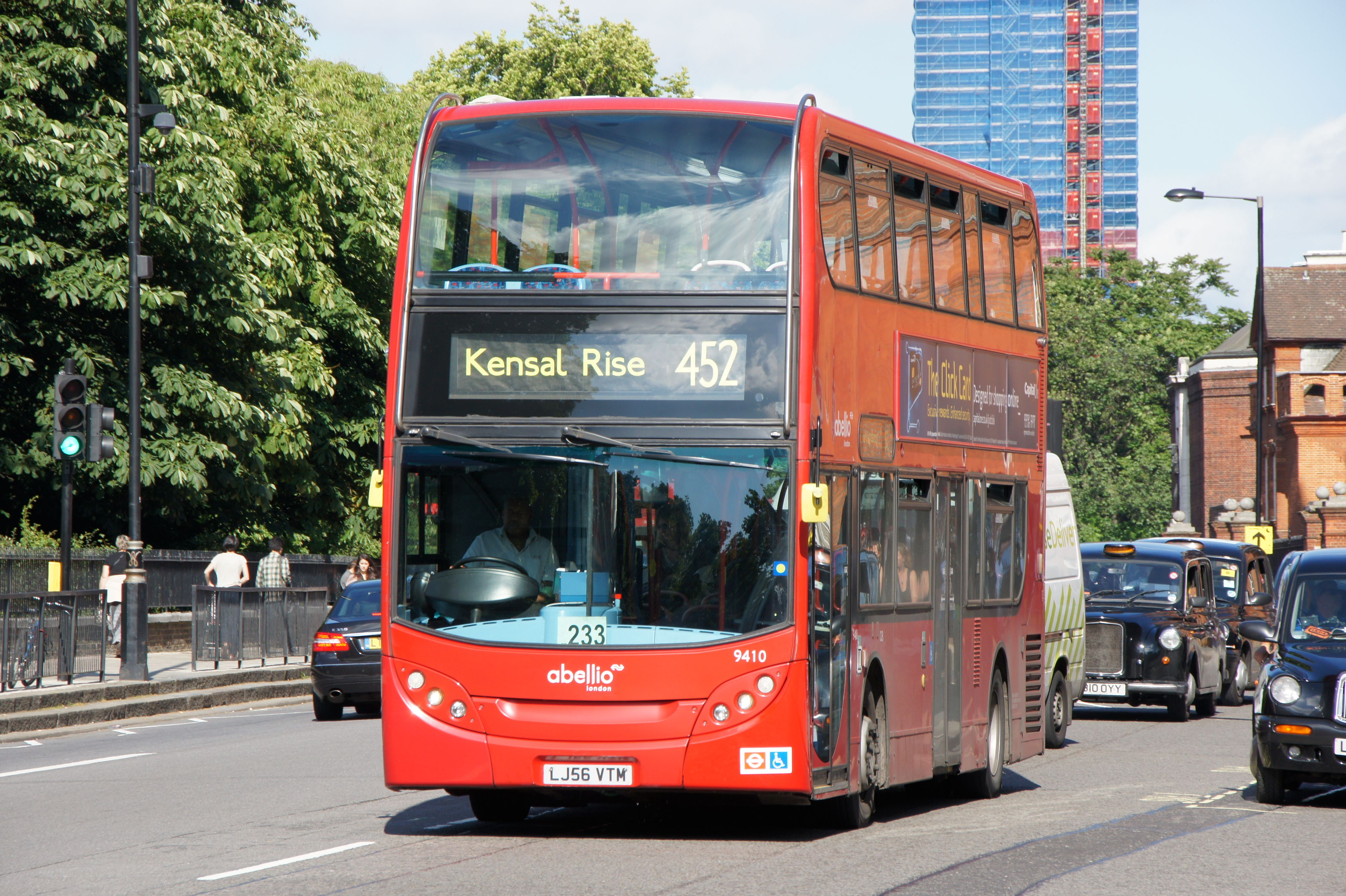 LJ56VTM 250611 CPS